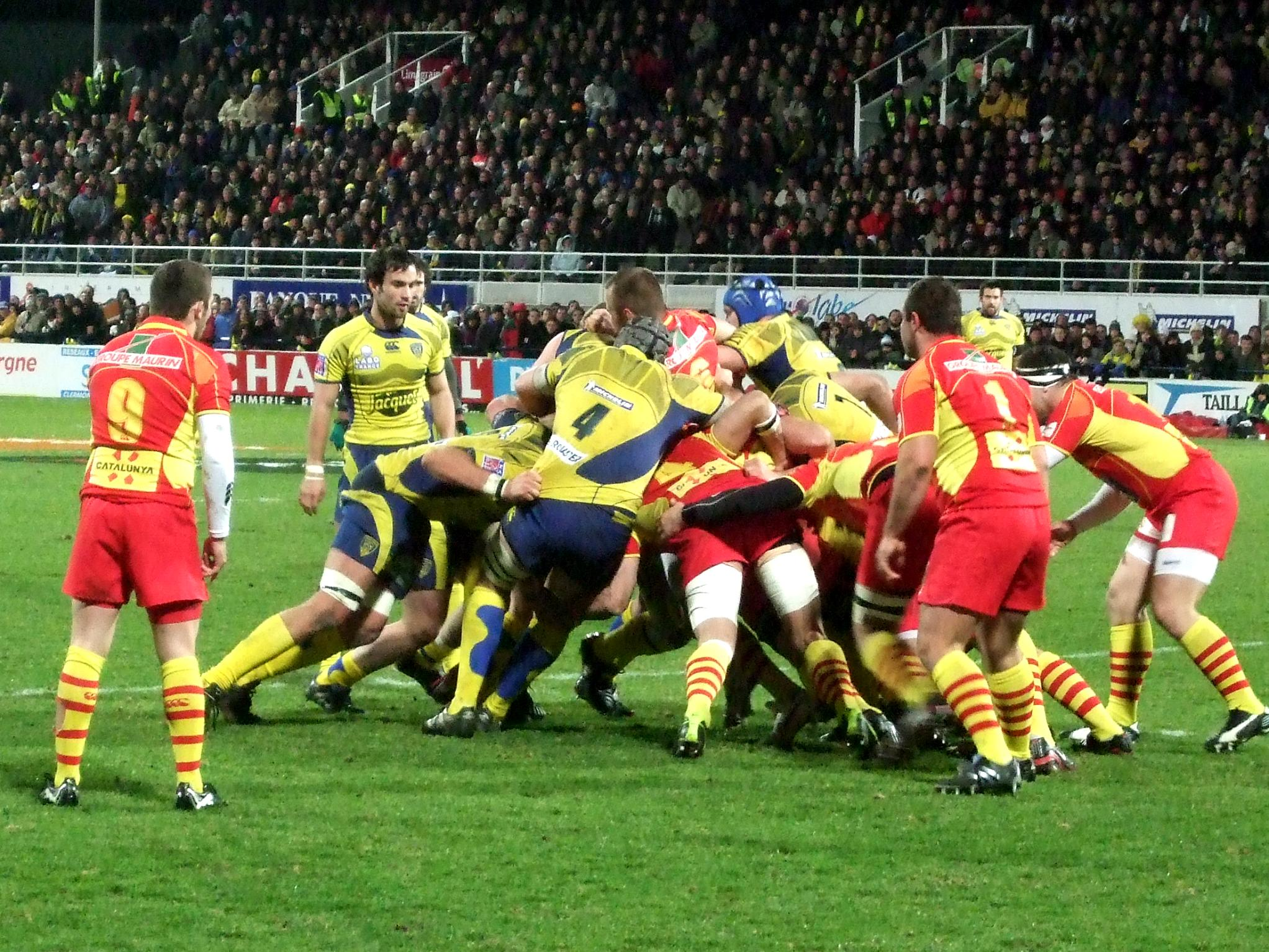 La formation d'un maul lors d'une rencontre opposant l'ASM Clermont Auvergne à l'USA Perpignan au Stade Marcel Michelin de Clermont-Ferrand